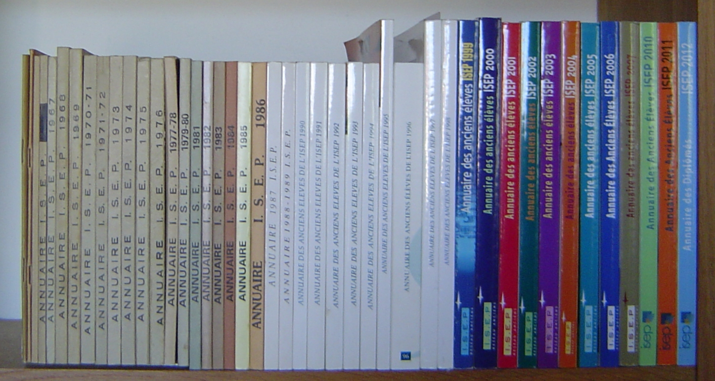 50 ans d'annuaires ISEP